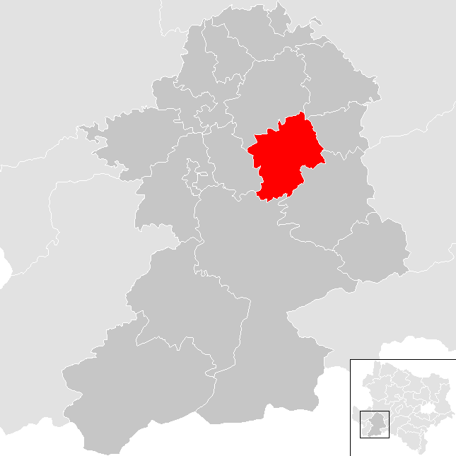 Bezirk Scheibbs